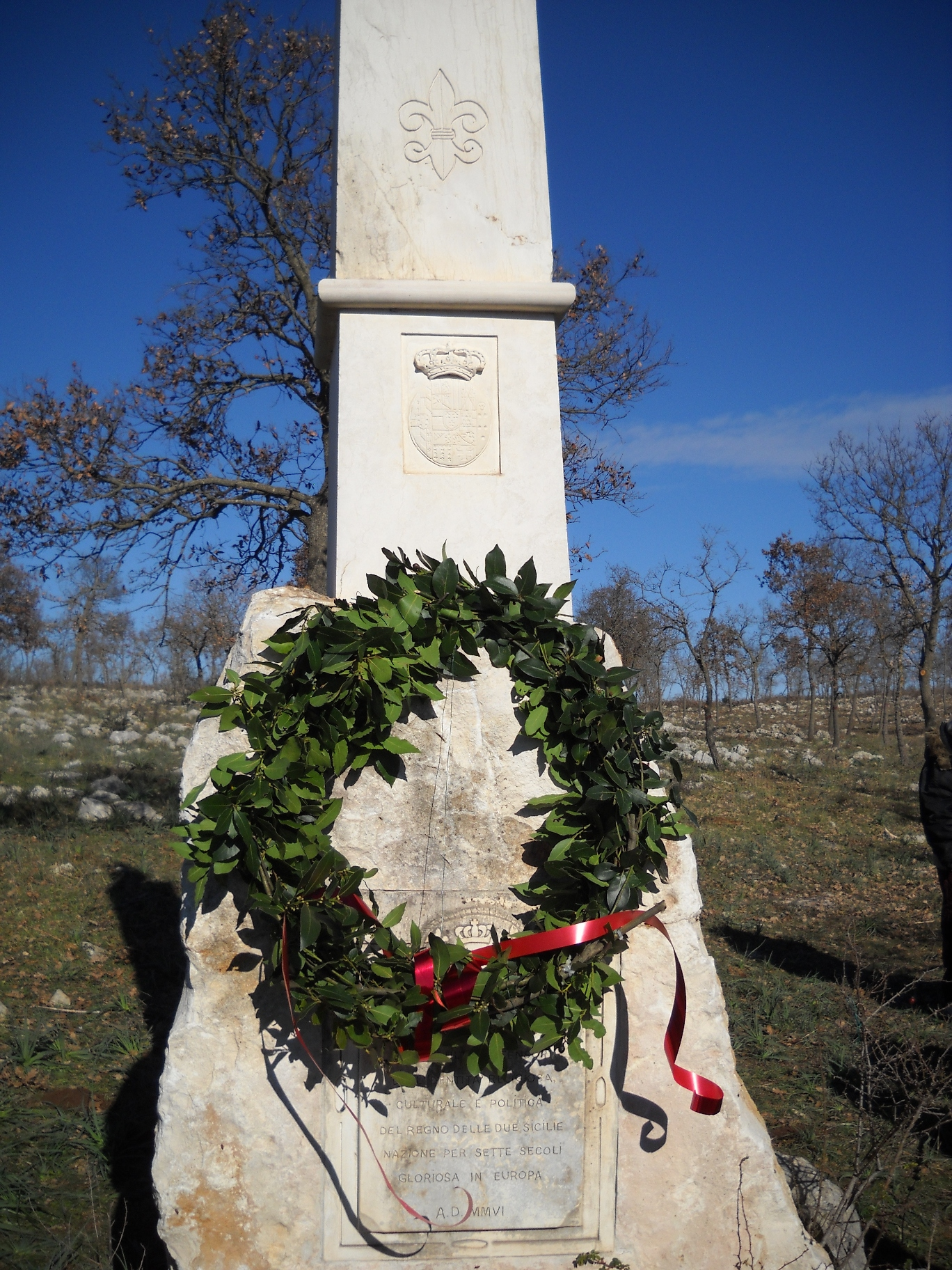 Cippo funerario nel bosco tra Gioia del Colle e Santeramo, luogo dell'epico scontro tra le Guardie Piemontesi e il Sergente Romano con i suoi "briganti".